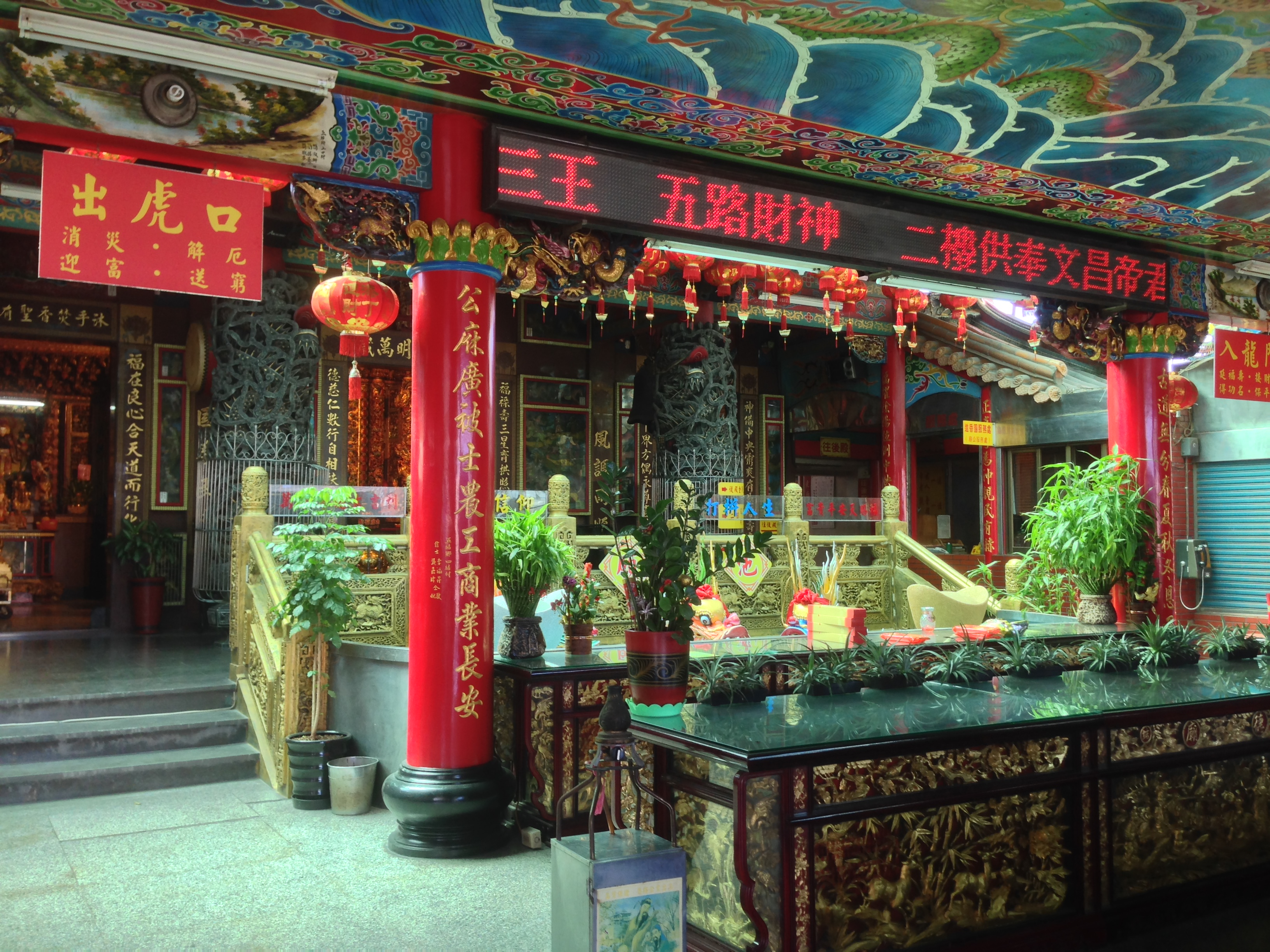 中文（台灣）: 四結福德廟門殿